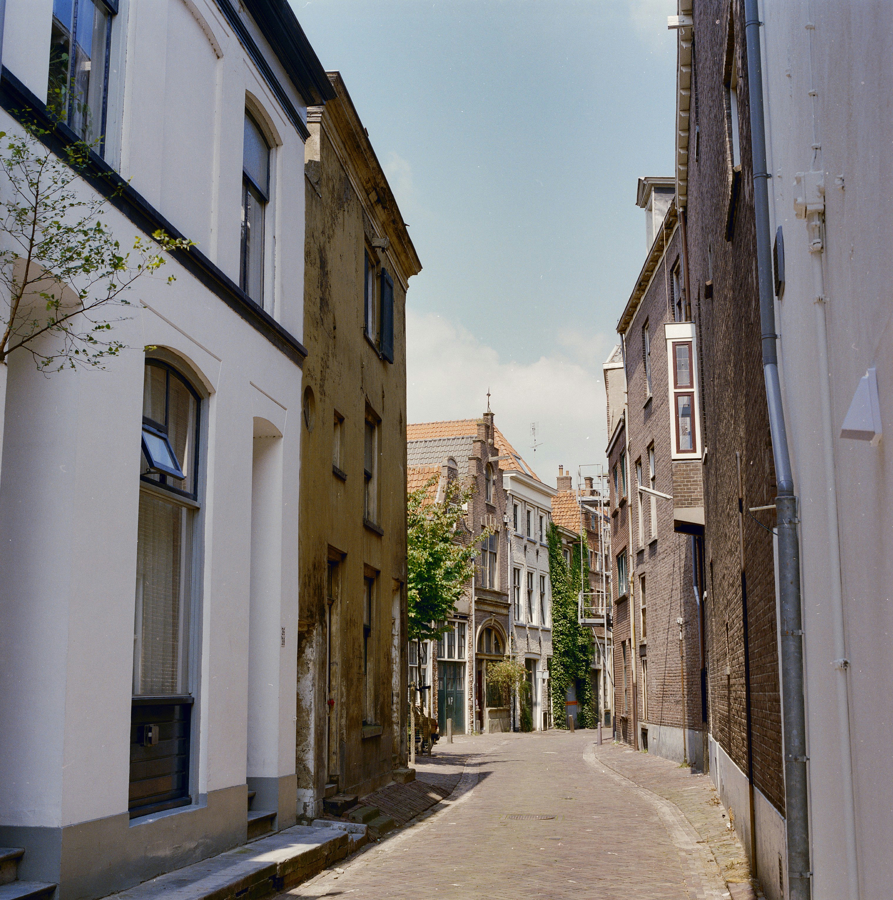 Exterieur OVERZICHT WATERSTRAAT